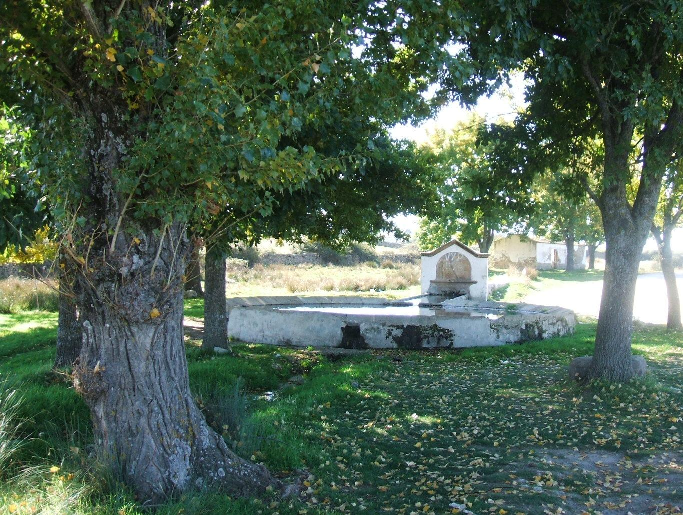 En Navas del Madroño la fuente de la Nacivera está en la cañada real de merinas, en la que siempre ha servido como abrevadero mesteño.